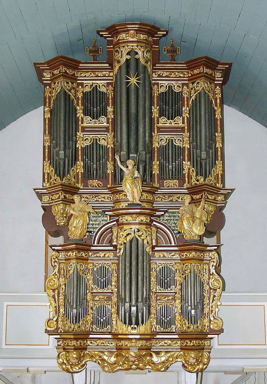 Schnitger Organ Cappel